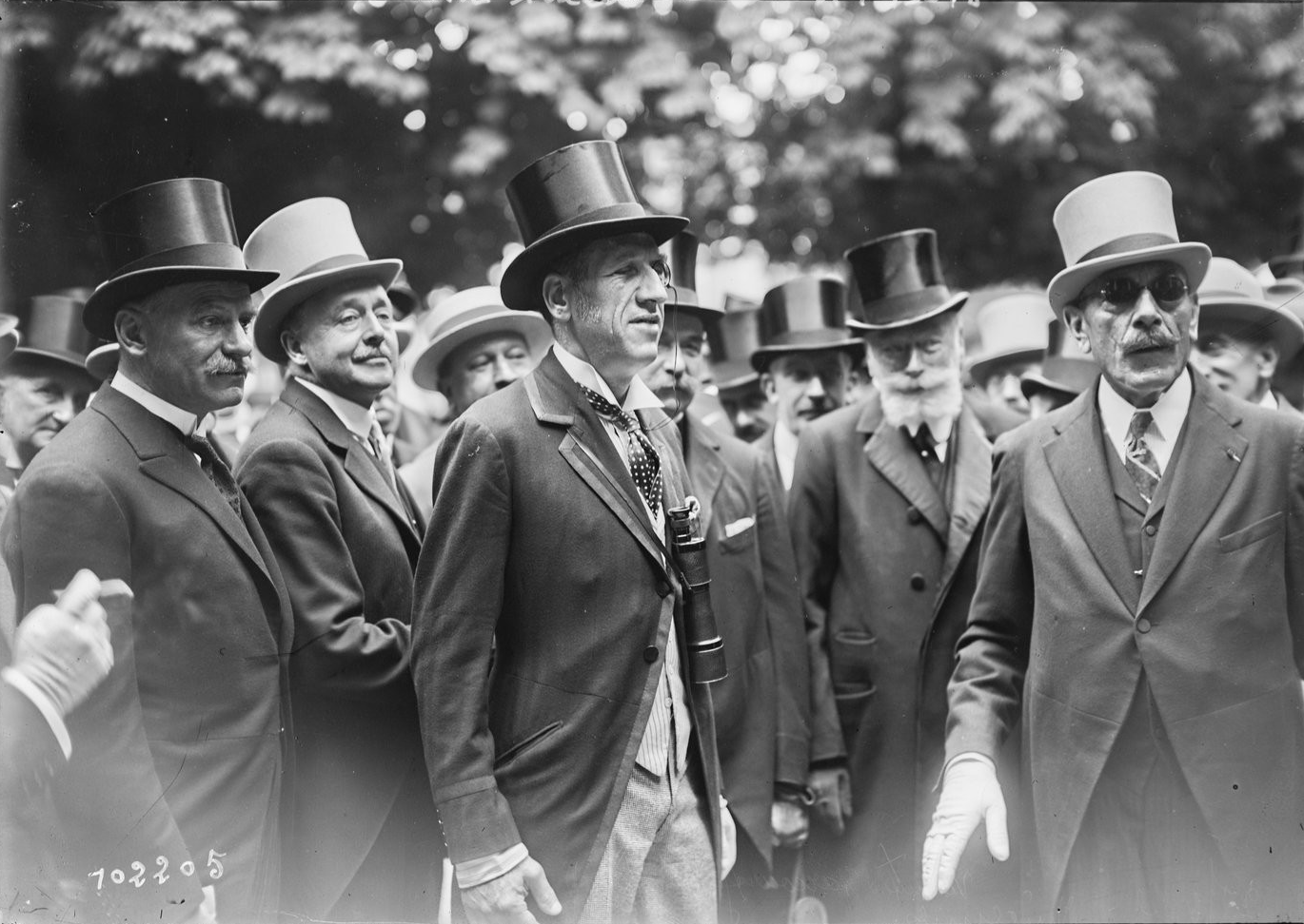 28-6-25, Vincennes (i.e. Longchamp), vicomte d'Harcourt (à g. et) James Armand Edmond de Rothschild (1878-1957) (à d.) - (photographie de presse) - (Agence Rol)